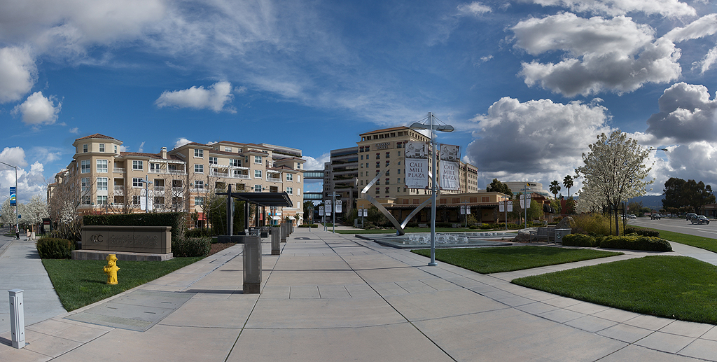 Cali Mill Plaza in Cupertino, California.